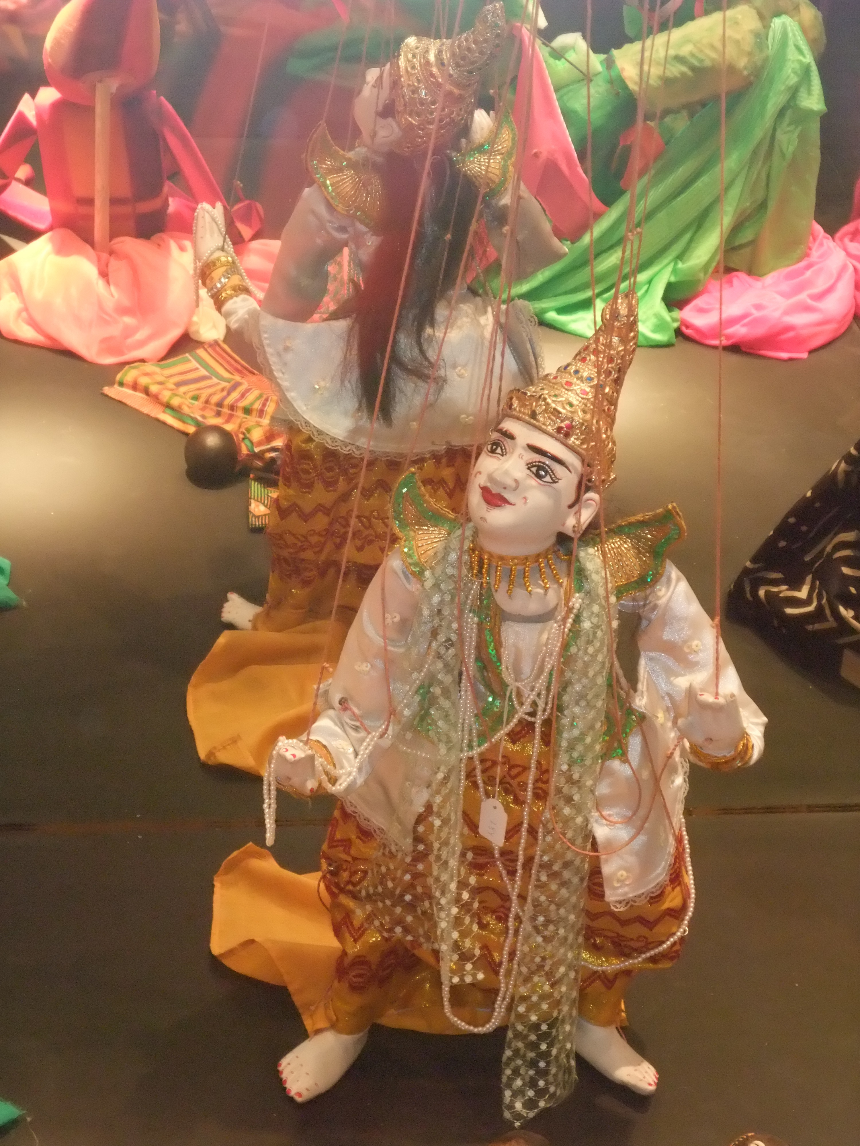 Tolosa (Guipúzcoa)-Museo Topic de títeres-13